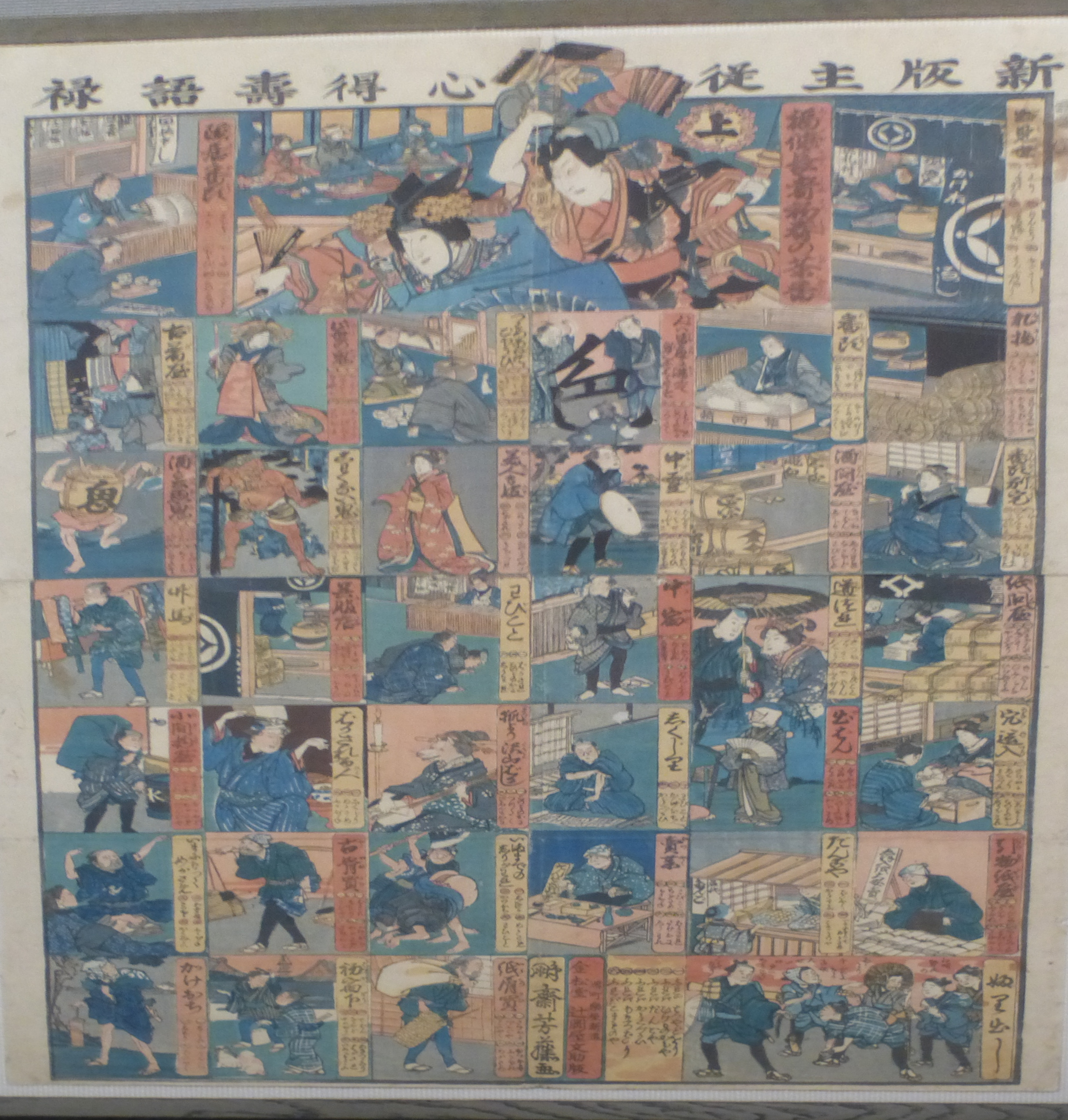 Sugoroku (すごろく)